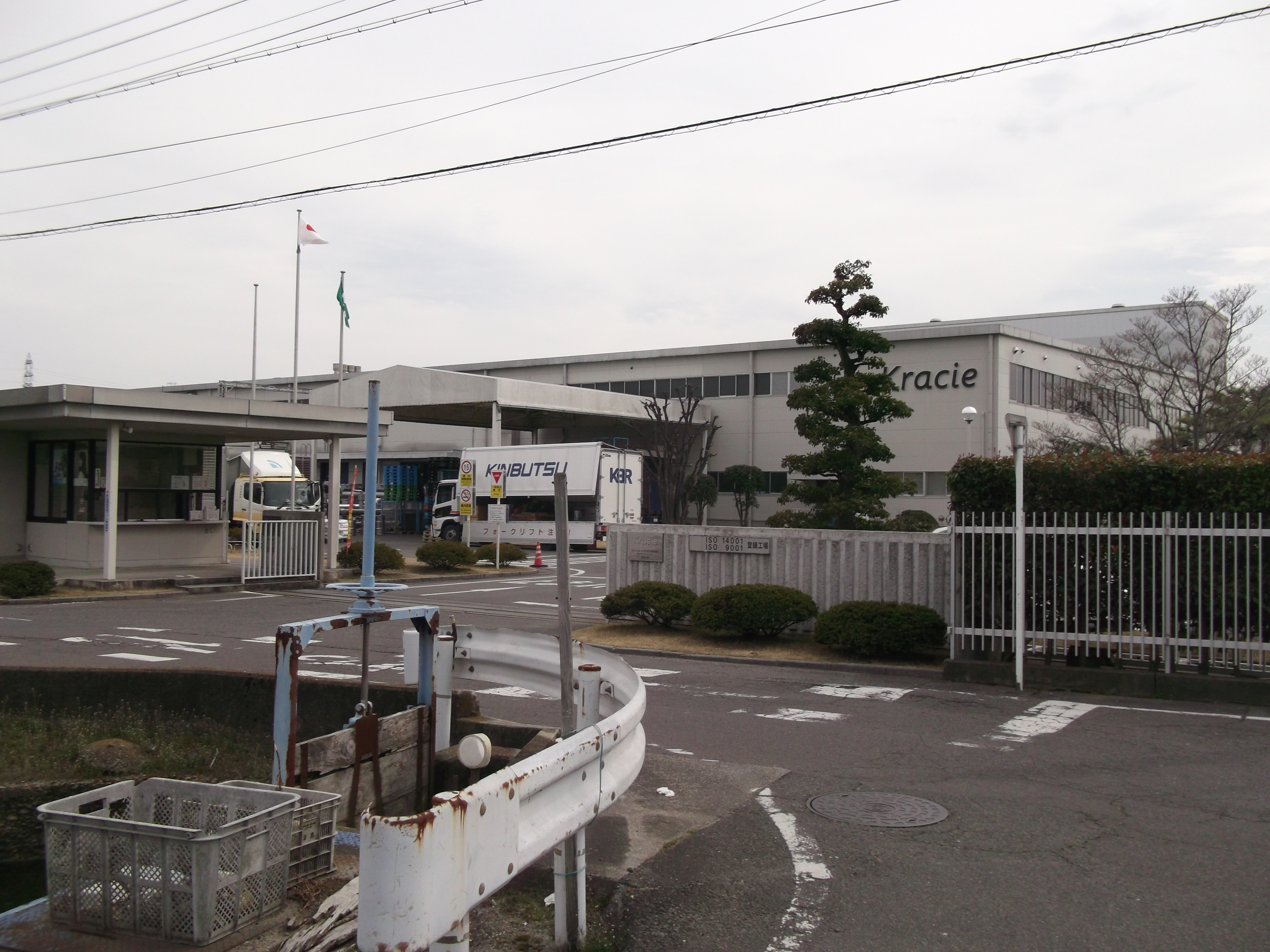 愛知県愛西市大野山町のクラシエホームプロダクツ津島工場を北西側より撮影